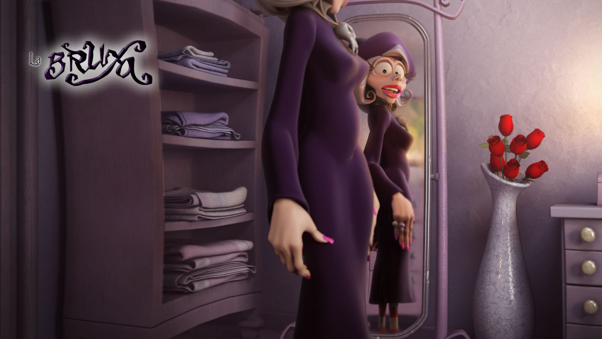 Fotograma del cortometraje "La Bruxa"de Pedro Solís García, ganador del Goya al mejor cortometraje de animación 2011.